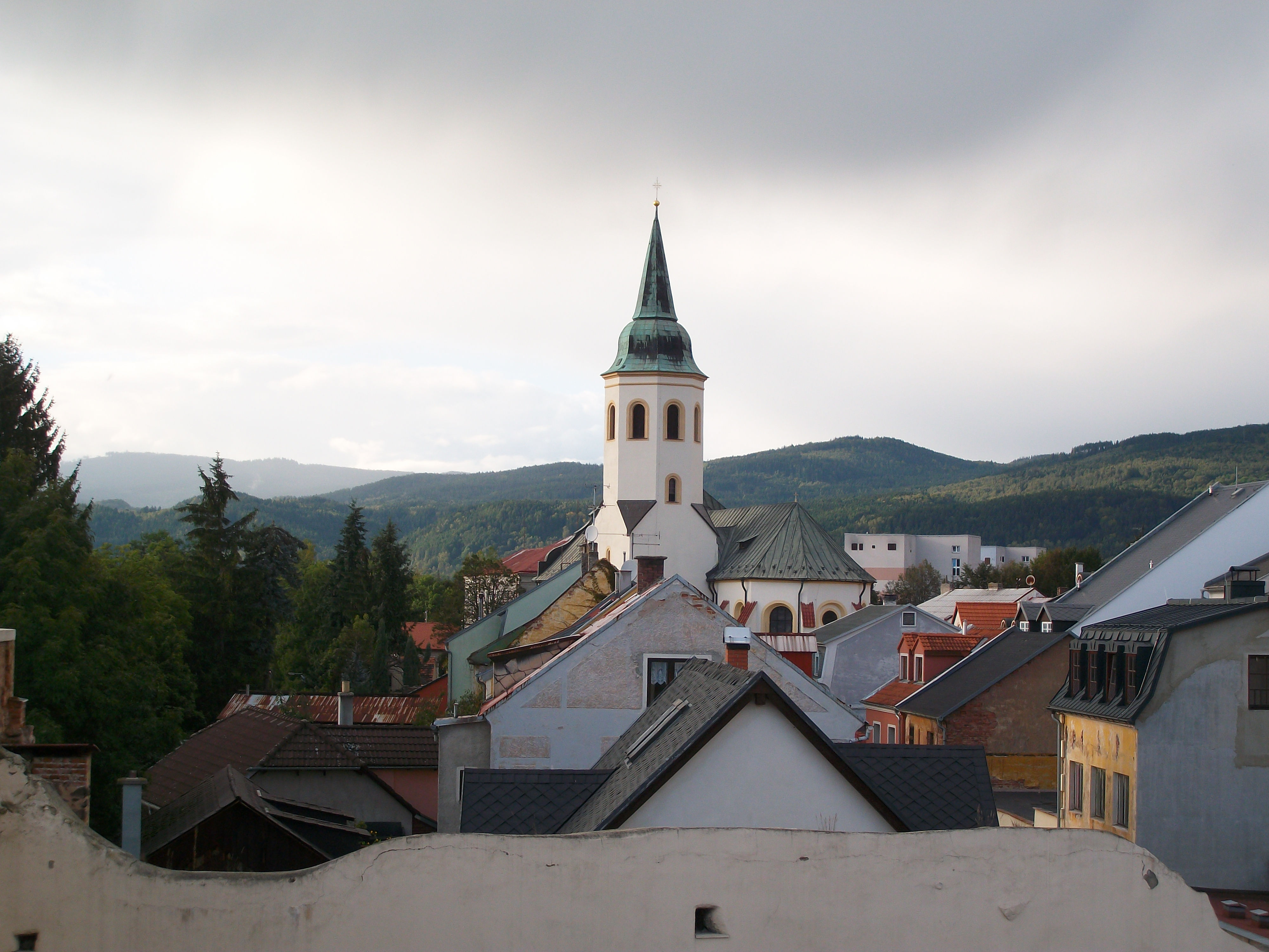 Ostrov nad Ohří with Church St. Michael